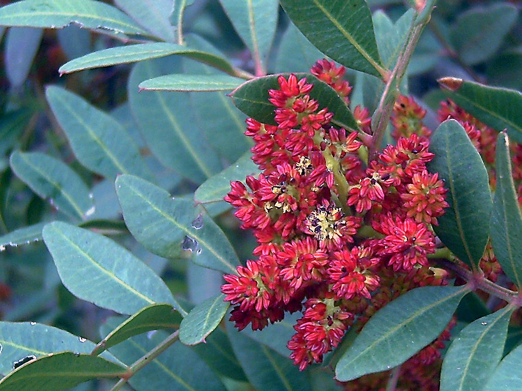 Pistacia_lentiscus in Sierra Madrona, inflorescence